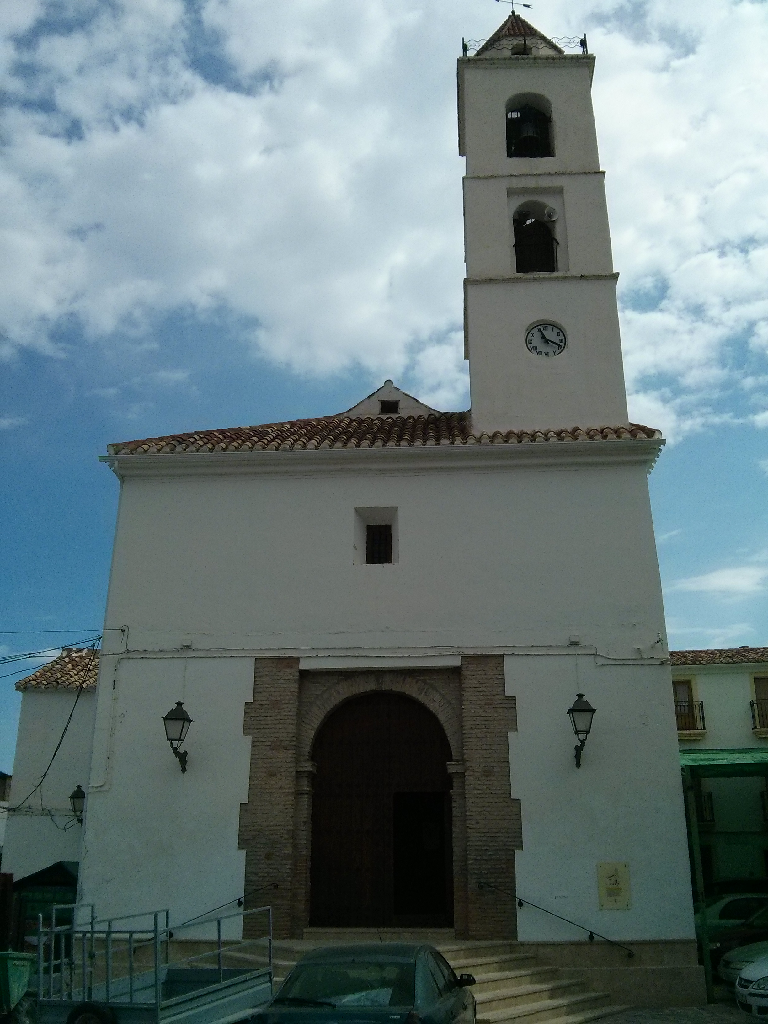 Iglesia Santa Maria de Bacares